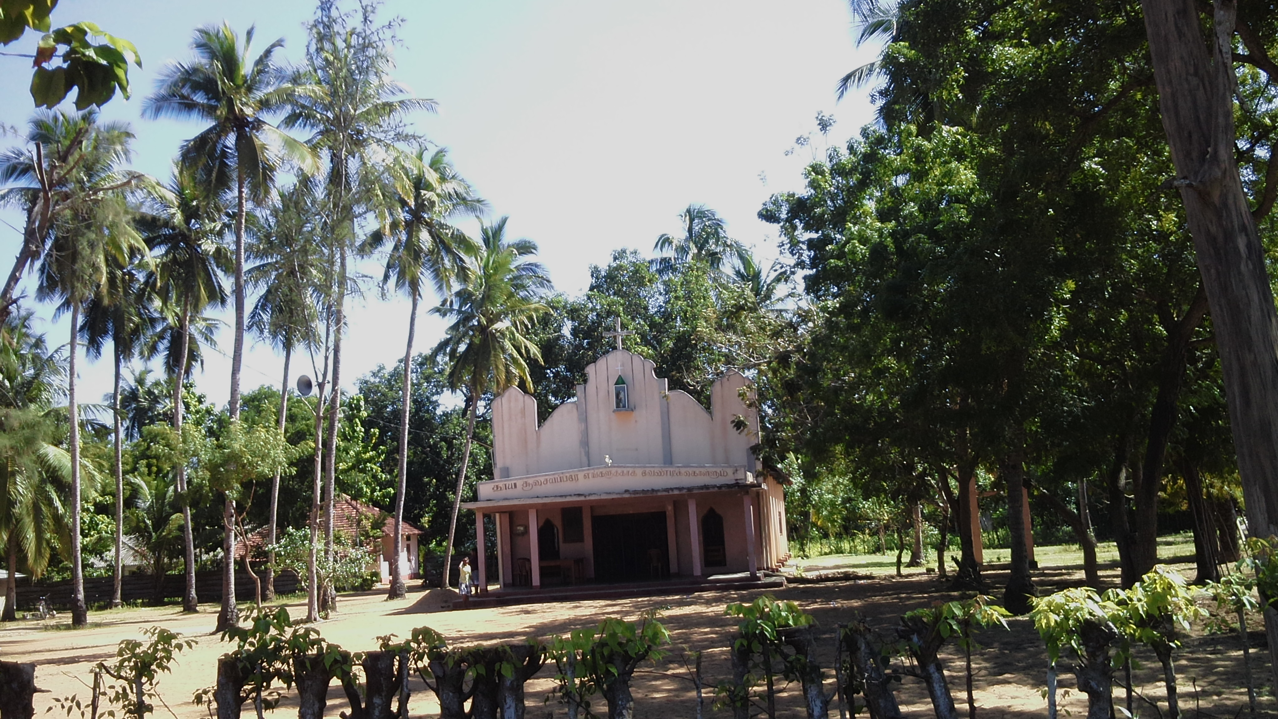 church